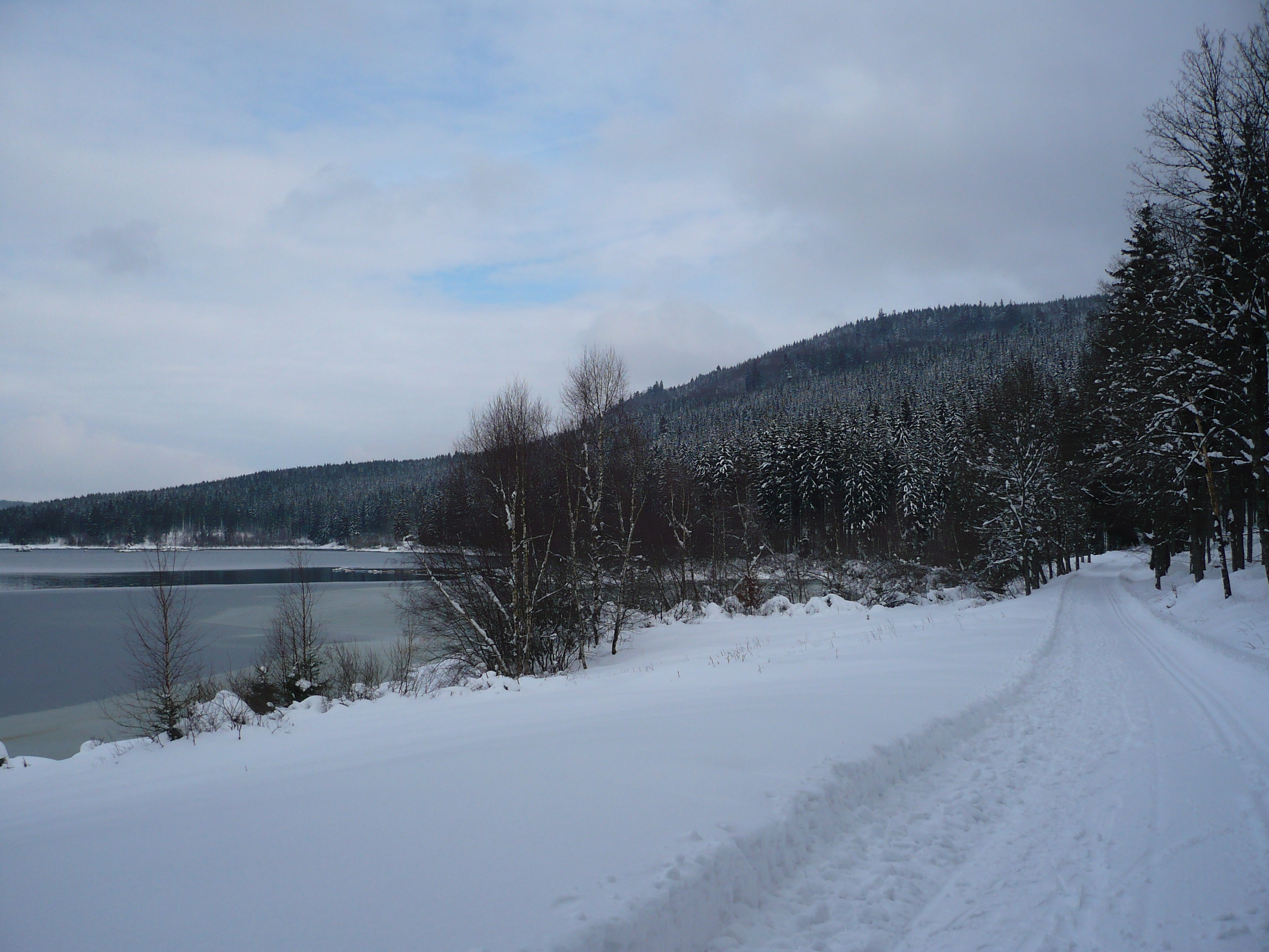 Seestrecke Unterkrummenhof - Staumauer Schluchsee